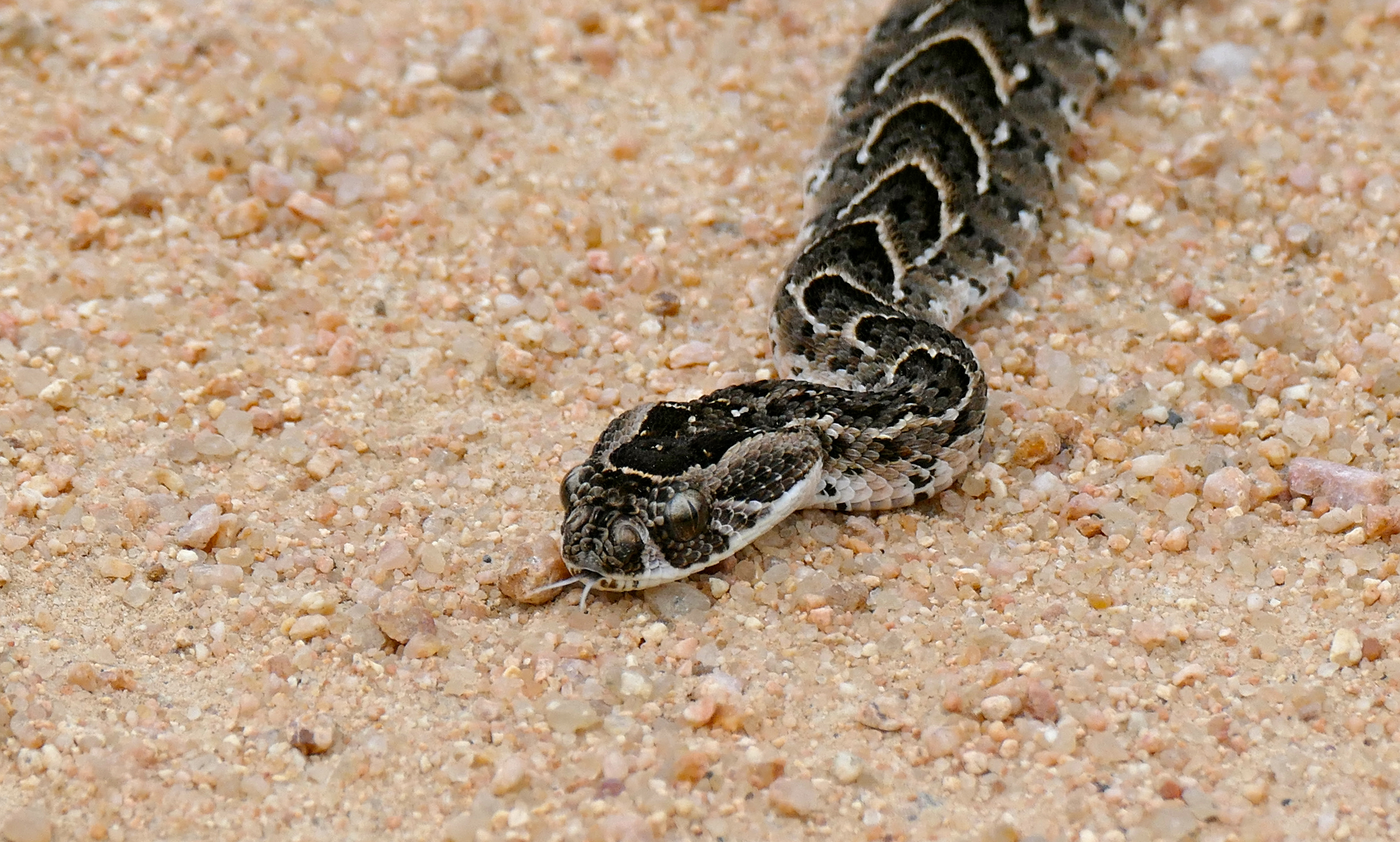 S21 Road West of Lower Sabie, Kruger NP, SOUTH AFRICA